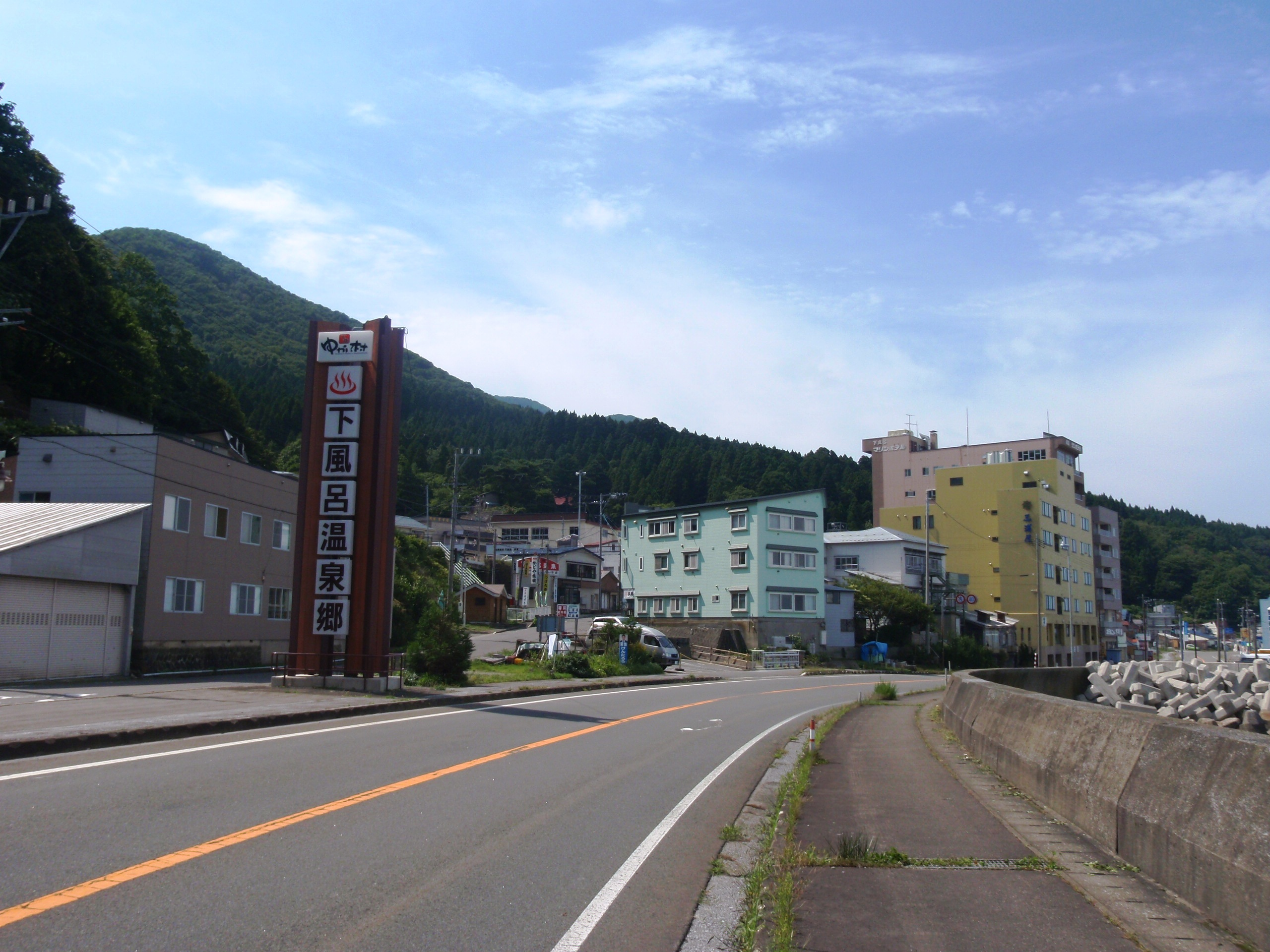 下風呂温泉街、国道からの入り口